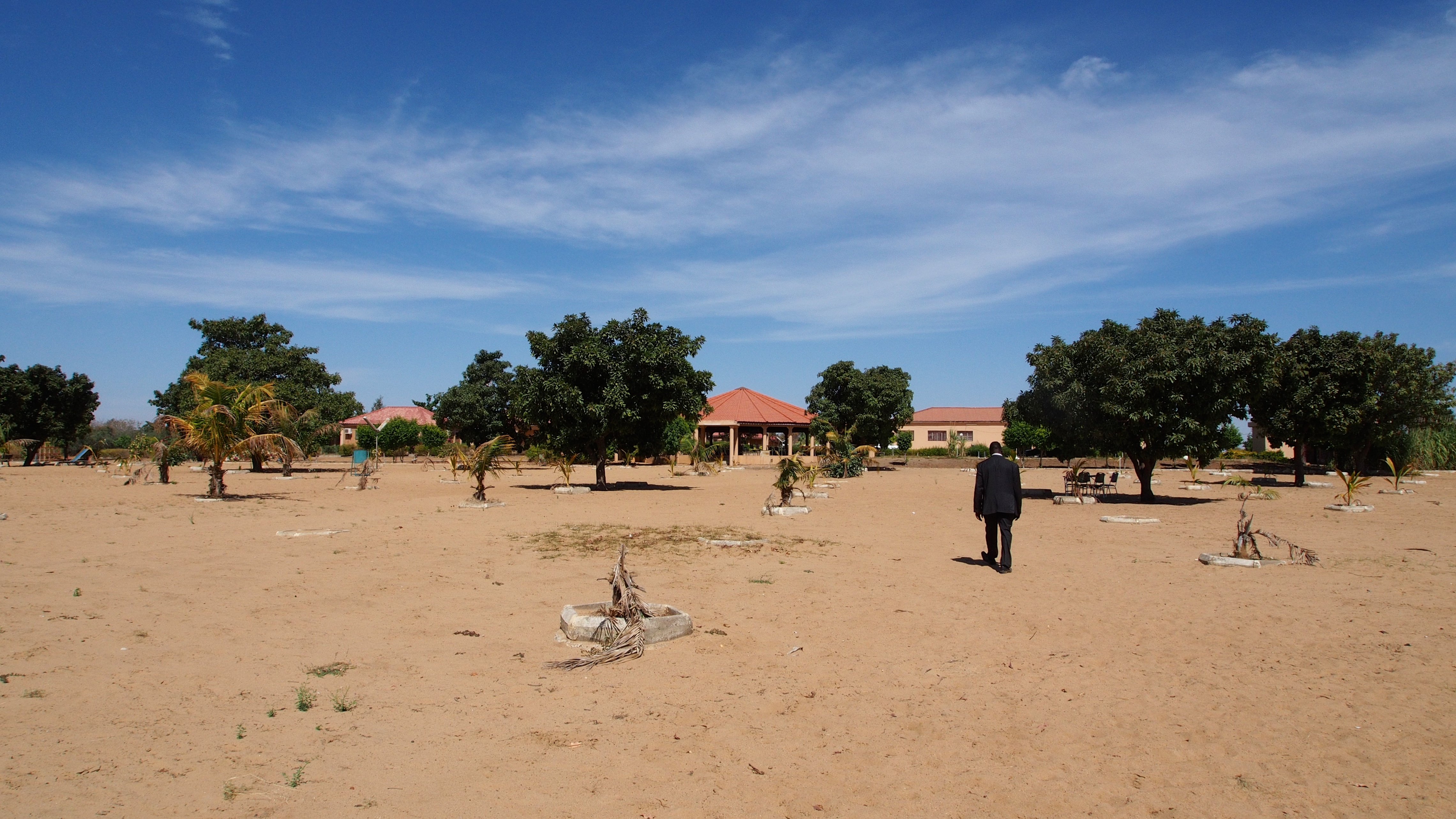 Centre touristique de Bagré, Burkina Faso